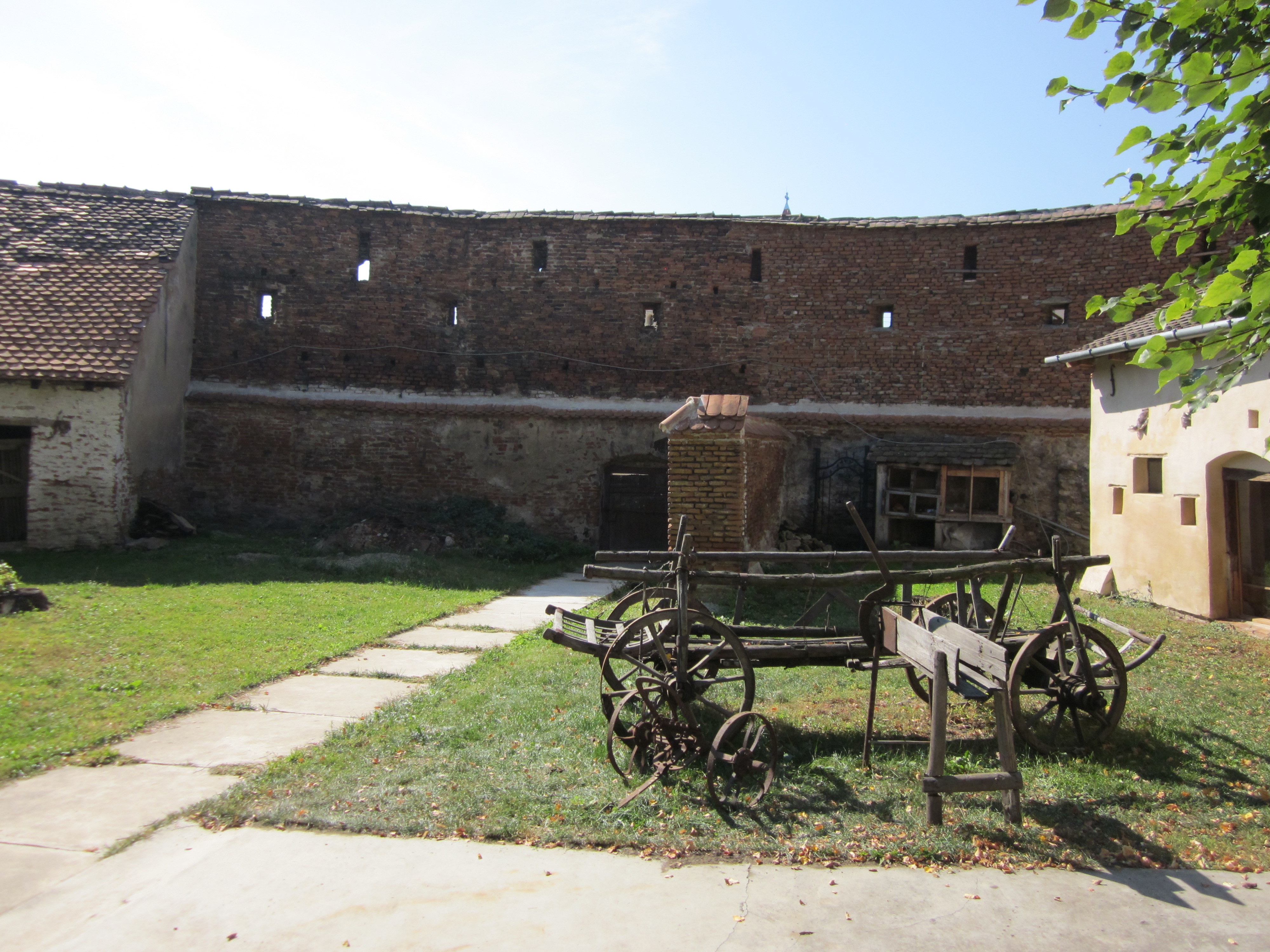 File:Biserica Fortificata din Axente Sever Sibiu Poza 6